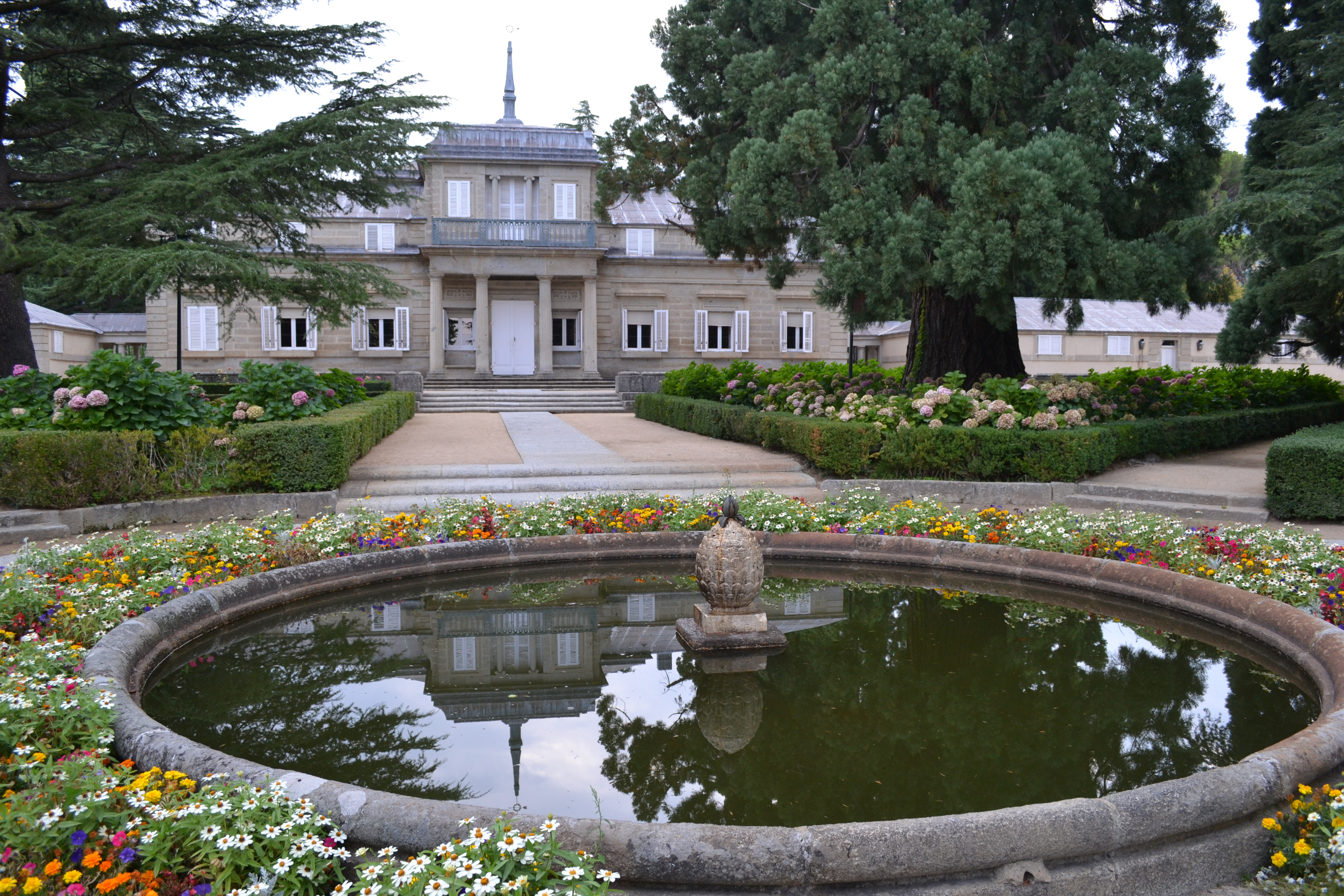 Casita del Príncipe (El Escorial).